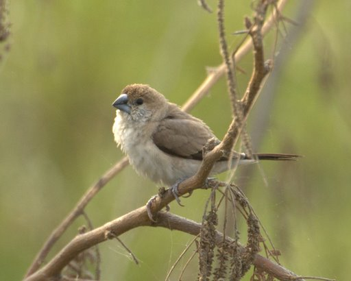 Indian Silverbill Lonchura_malabarica